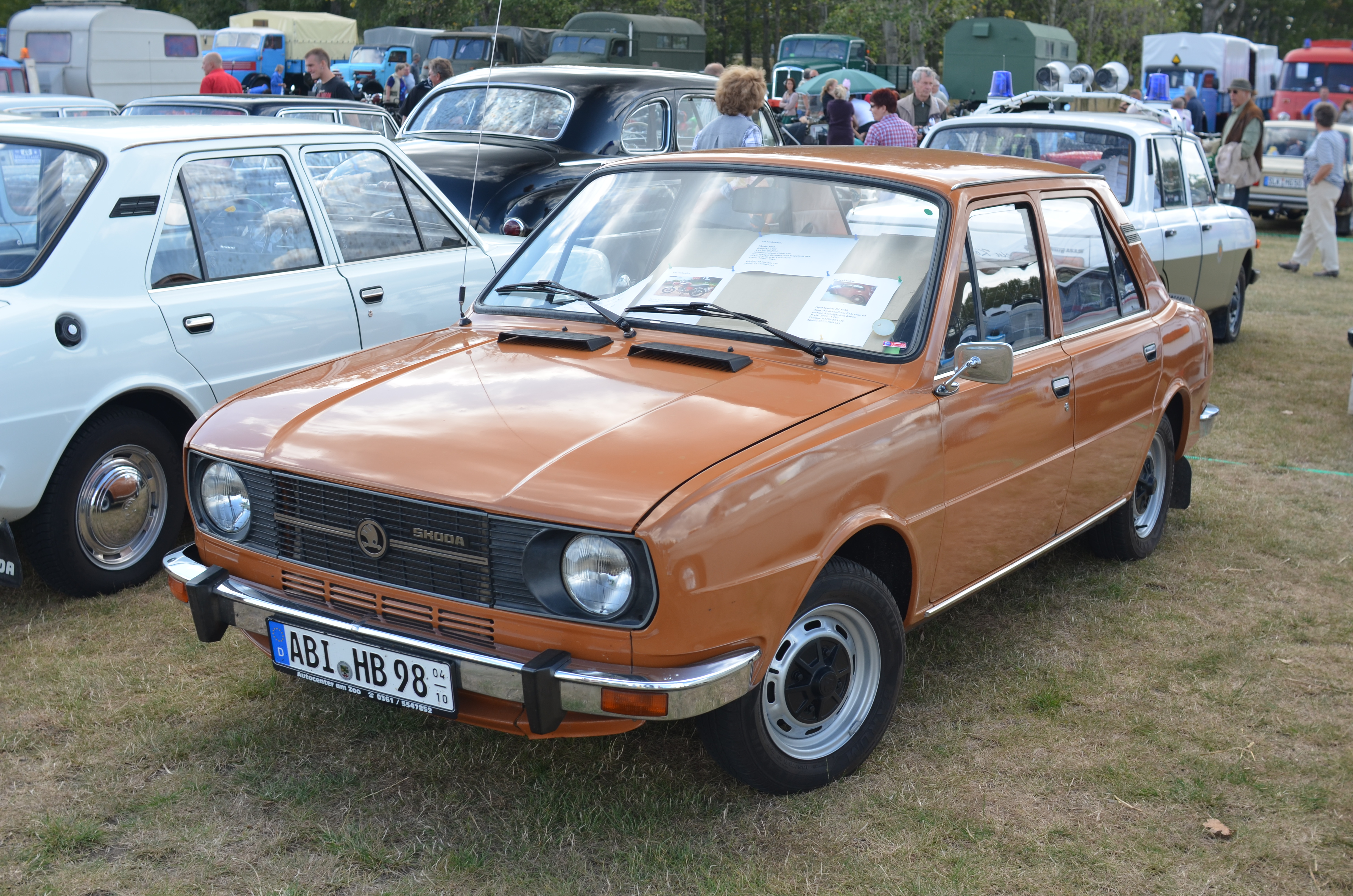 Skoda